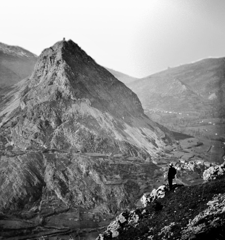 Fonds Trutat - Photographie ancienne Cote : TRU C 2549 Localisation : Fonds ancien (S 30) Original non communicable Titre : Bedeilhac, rocher de Calames, Ariège Auteur : Trutat, Eugène Rôle de l’auteur : Photographe Lieu de création : Tarascon-sur-Ariège (Ariège ; canton) Date de création : 1859-1910 [entre] Mesures : : 9 x 9,5 cm Mot(s)-clé(s) : -- Montagne -- Neige -- Sommet (montagne) -- Versant -- Homme -- Alpinisme -- Randonnée pédestre -- Hiver -- Tarascon-sur-Ariège (Ariège ; canton) -- Buttes de Colomes et de Soudou (Ariège) -- Ariège (Midi-Pyrénées) -- Ariège (France ; haute vallée) -- Pyrénées (France) -- 19e siècle, 2e moitié -- 20e siècle, 1e quart Médium : Photographies -- Négatifs sur plaque de verre -- Noir et blanc -- Collodion albuminé -- Paysages de montagne Voir : TRU C 2546 Buttes de Calames et de Soudou, près Bibliothèque de Toulouse. Domaine public